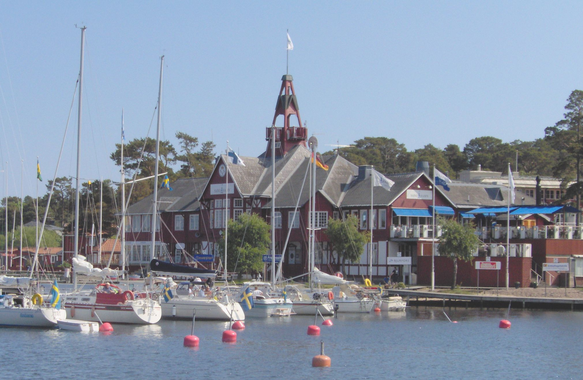 Sandhamns hotell i Stockholms skärgård. 2005. Ursprungligen klubbhus för KSSS. Invigt 1897. Arkitekt Fredrik Liljekvist Sandhamns hotel in the Stockholm archipelago. 2005. L'hôtel de Sandhamn dans l'archipel de Stockholm. 2005.